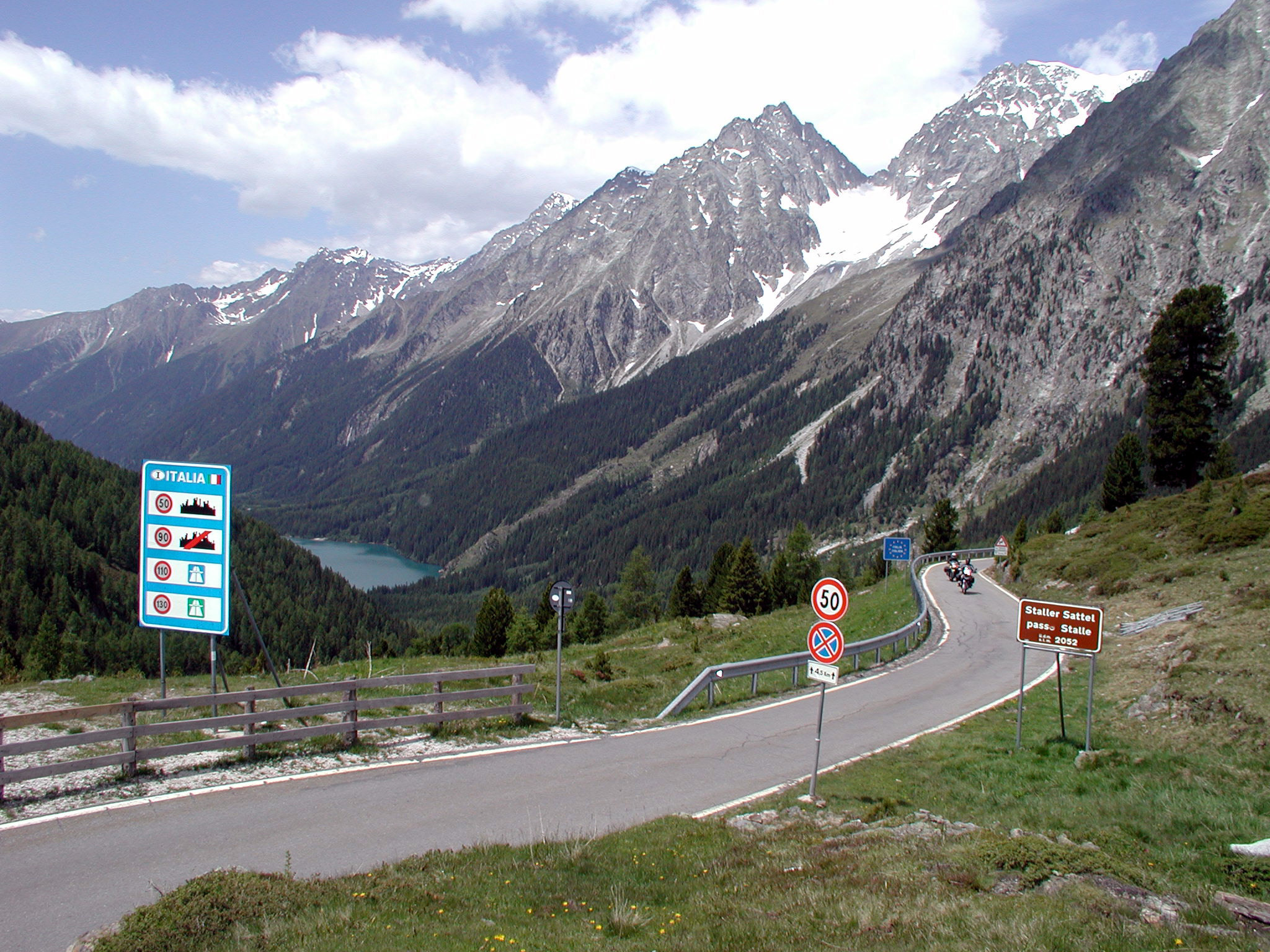 Staller Sattel